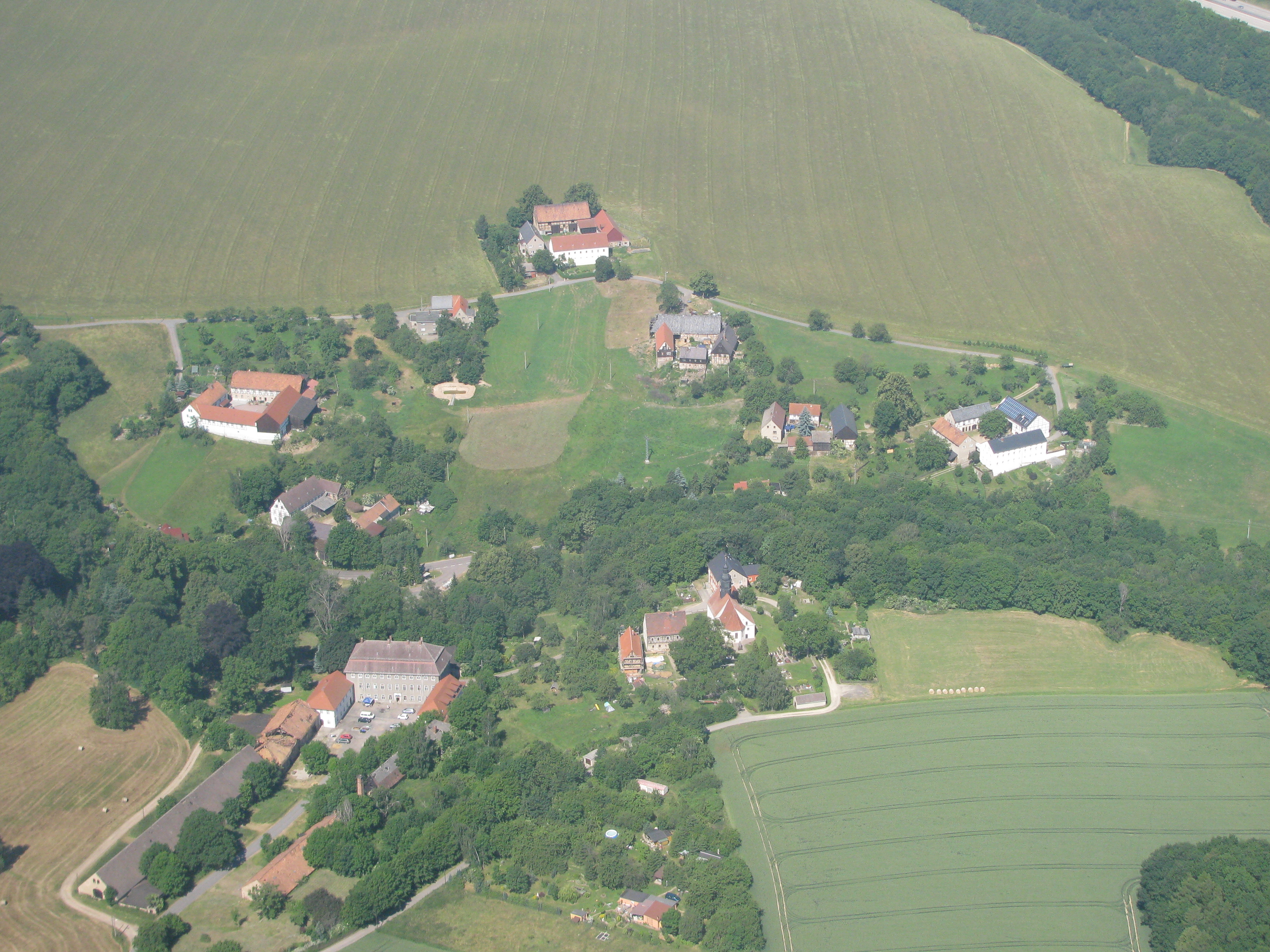 Luftbild Tanneberg, Triebischtal